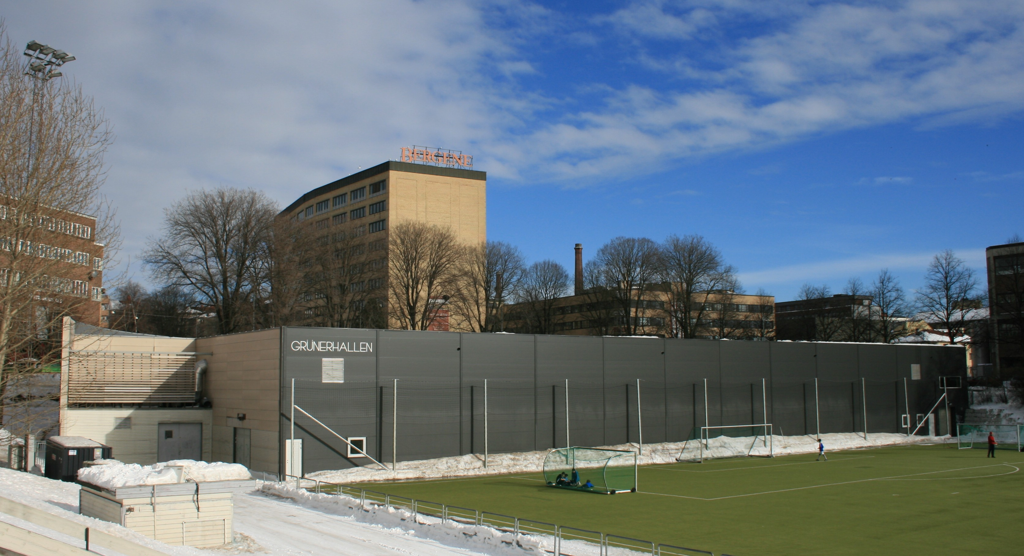 Grünerhallen er en ishall på Dælenenga i Oslo som ble åpnet 6. oktober 1995